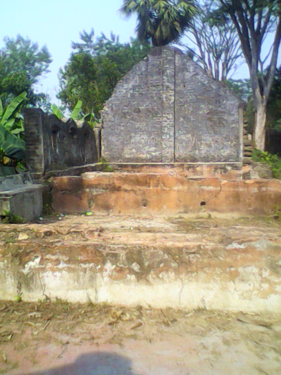 ভাটপাড়া নীলকুঠি